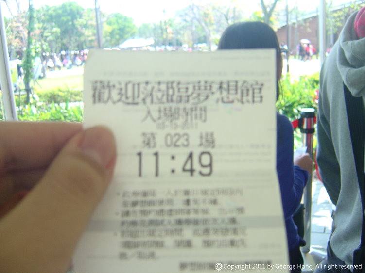 2010年臺北國際花卉博覽會夢想館預約券。